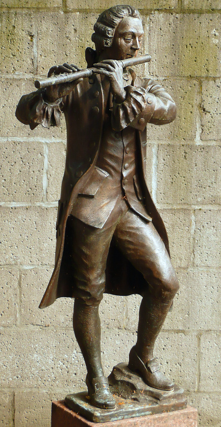 Quanz Statue Scheden